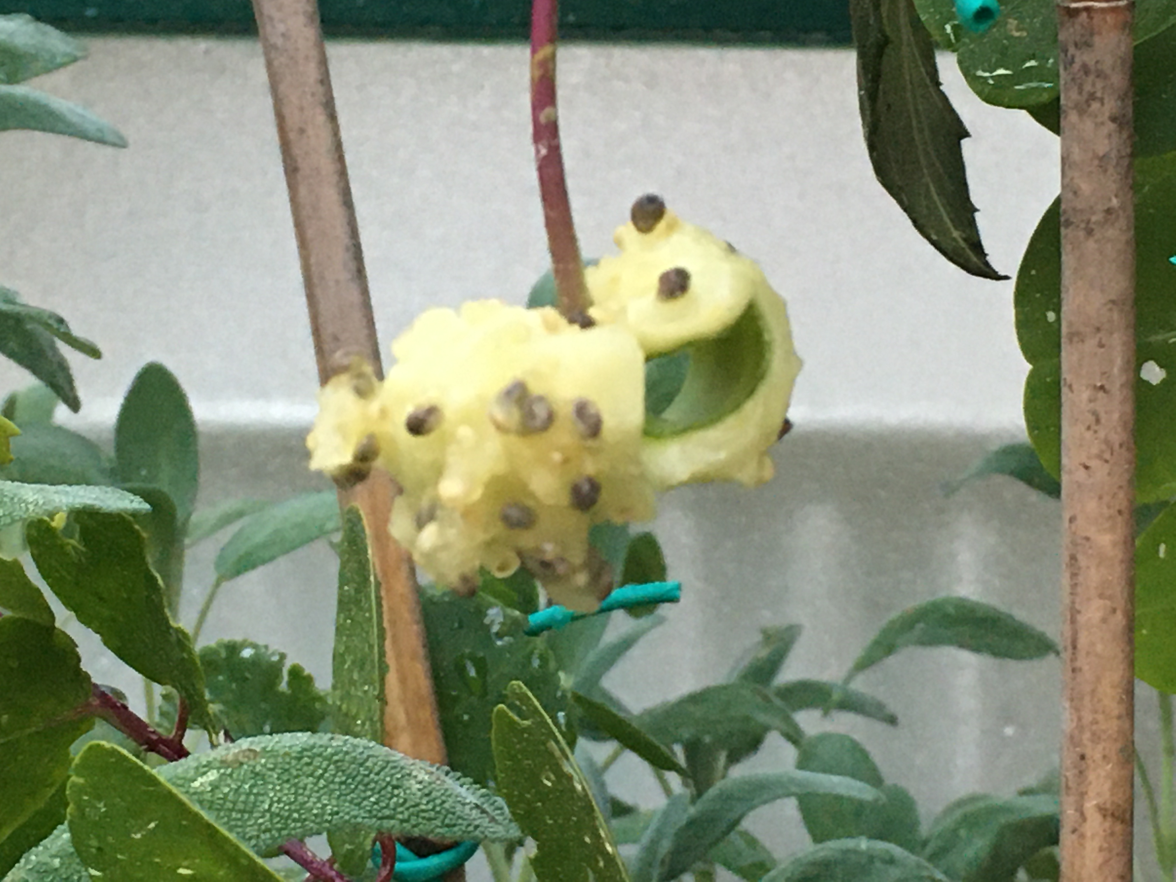 Frutto maturo pronto al rilascio dei semi